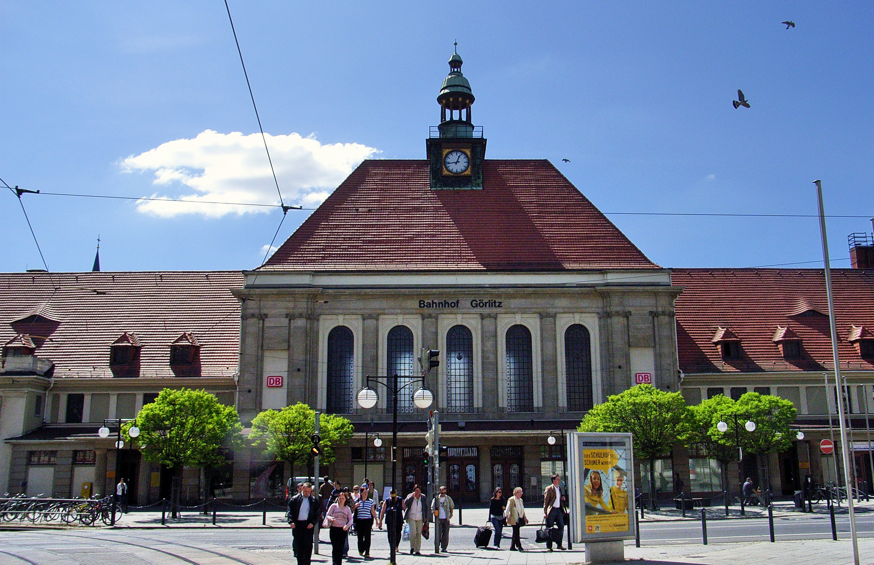 Ренесансова сграда в Гьорлиц.